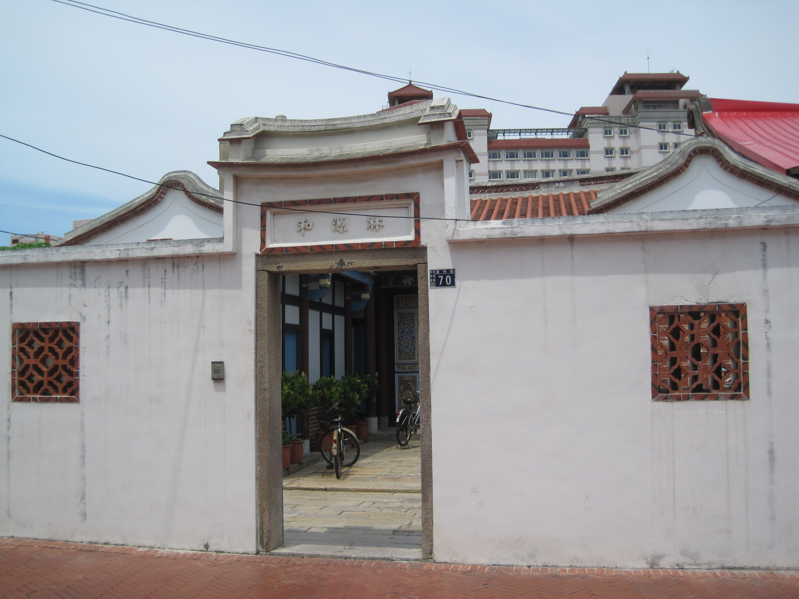 中文（台灣）: 日茂行小合院